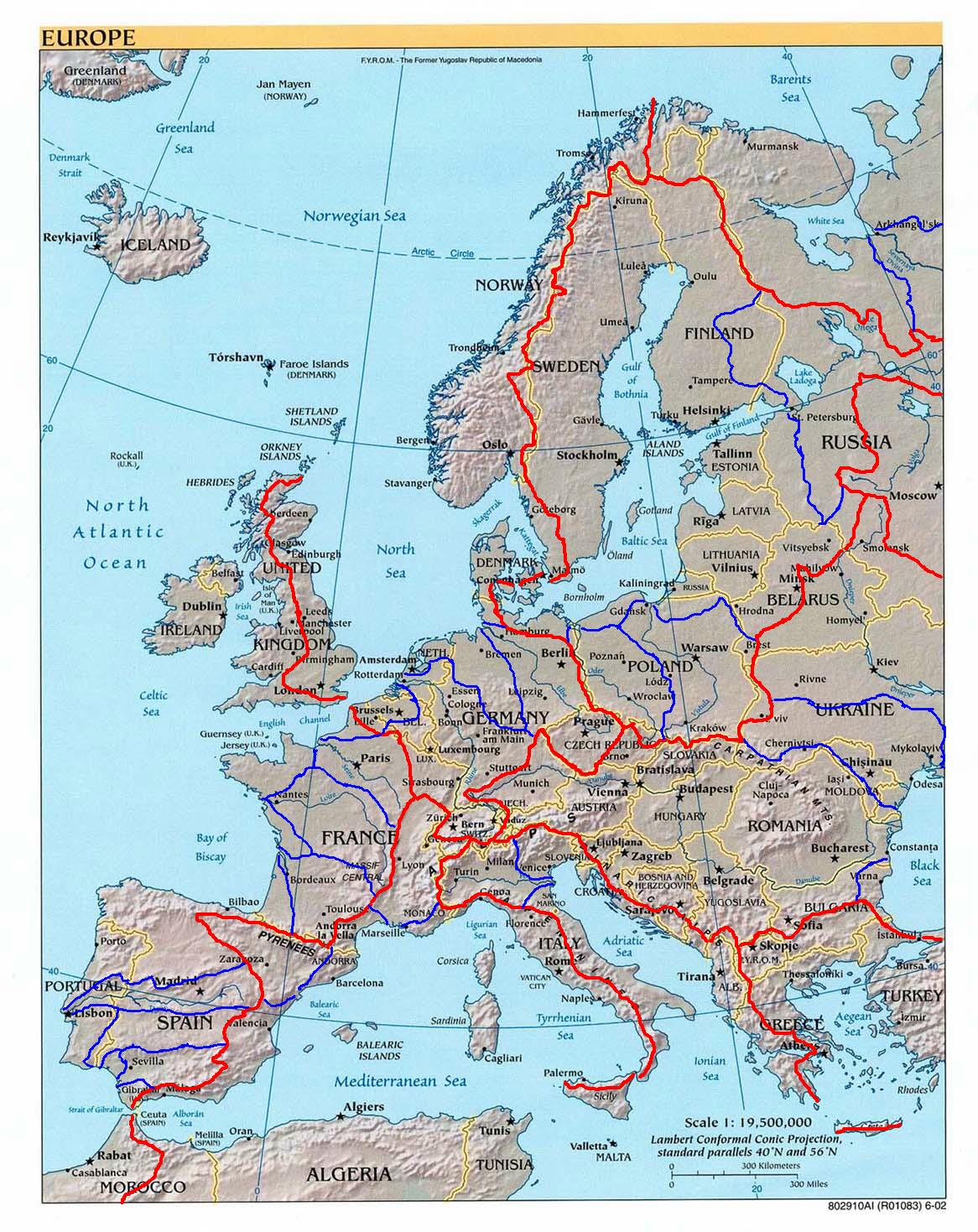 Rozvodí evropských úmoří (červeně) a jejich nevýznamnějších povodí (modře).